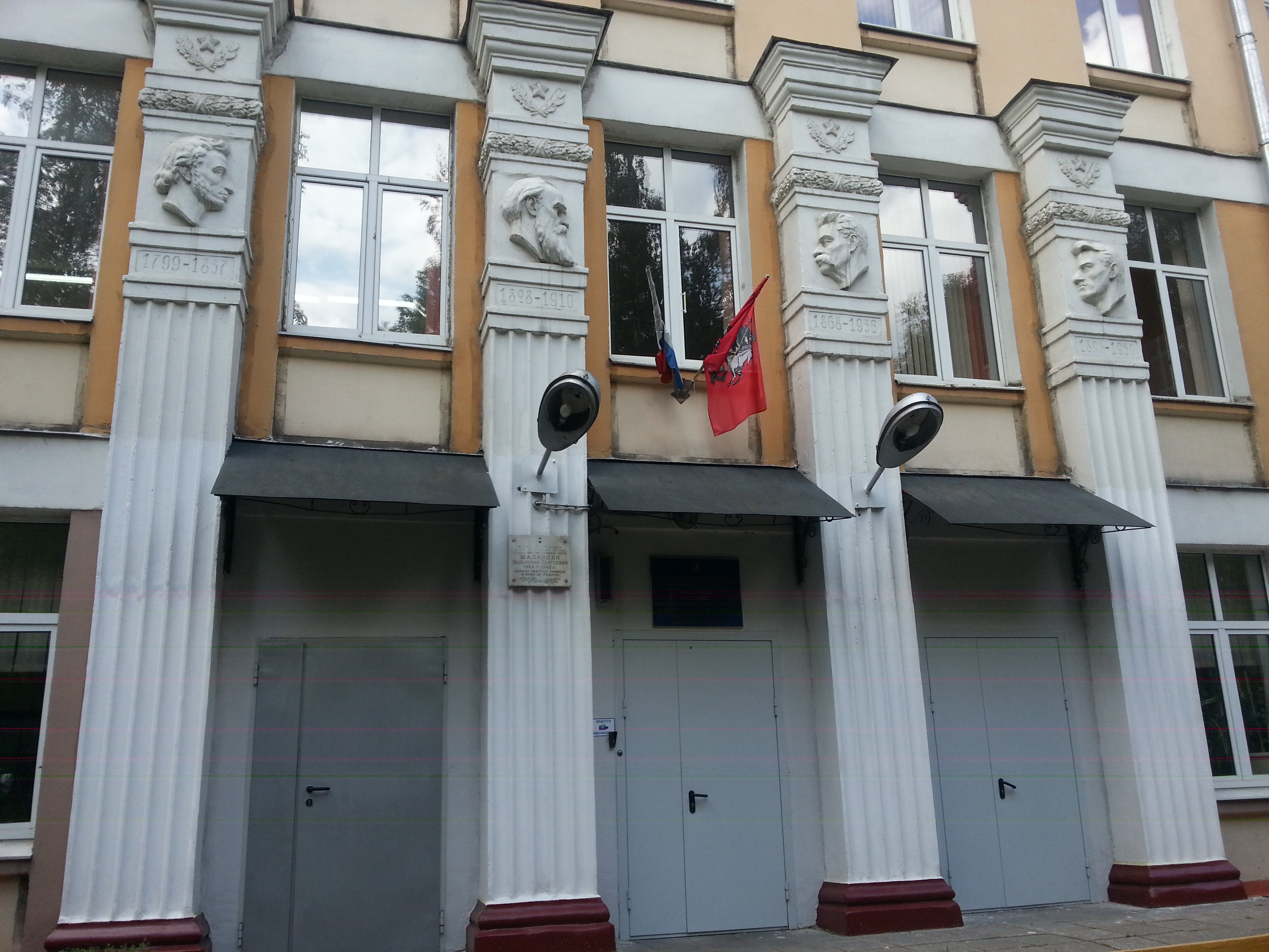 Средняя общеобразовательная школа № 434, ул. Благуша, Москва. 15 июня 2016г.